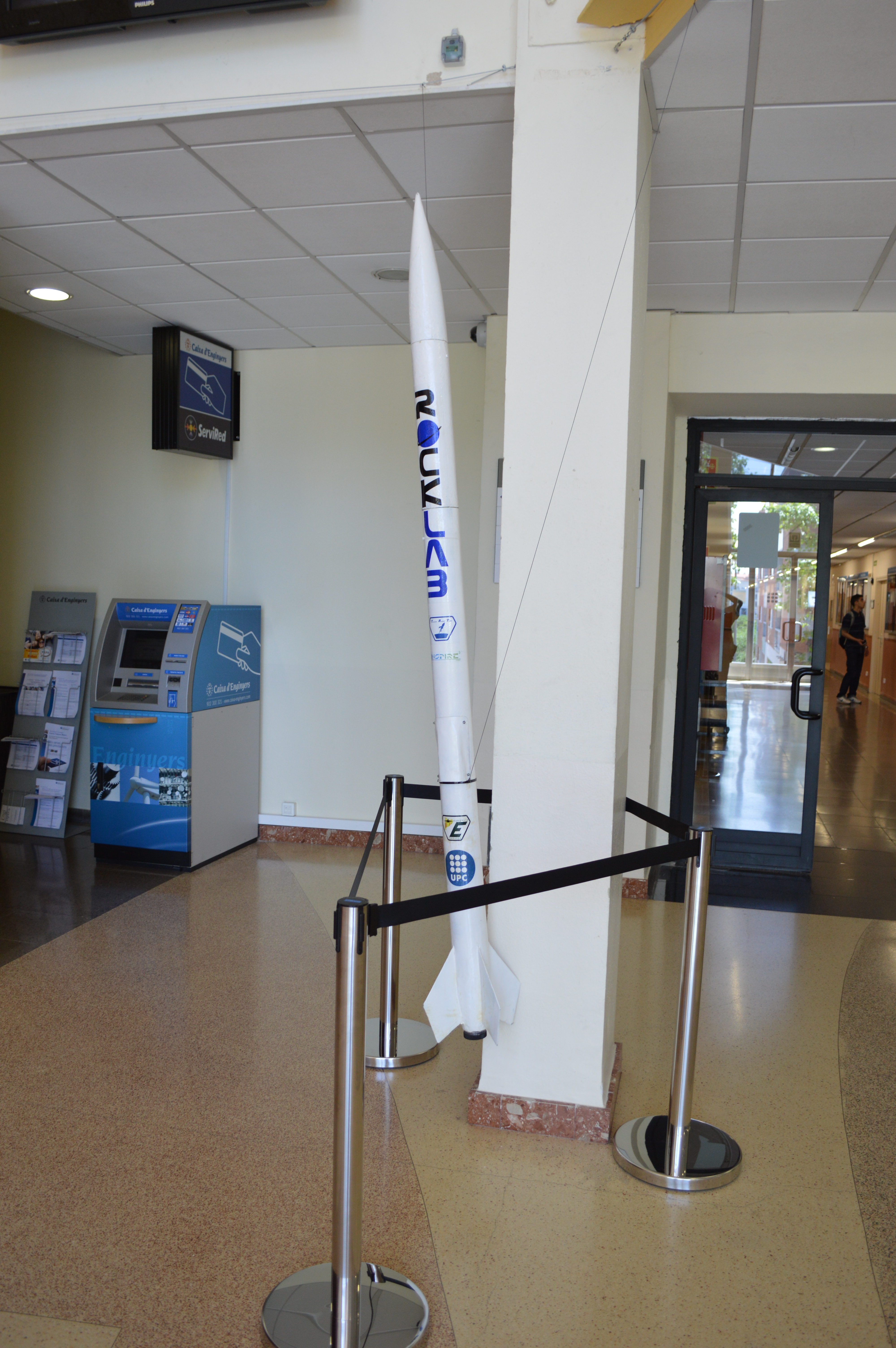 Coet ROCKLAB del Terrassa Rocket Team exposat a l'entrada de l'Escola Tècnica Superior d'Enginyeria Industrial i Aeronàutica de la UPC. El Terrassa Rocket Team és un projecte associat a EUROAVIA i que compte amb el suport del programa INSPIRE 3.